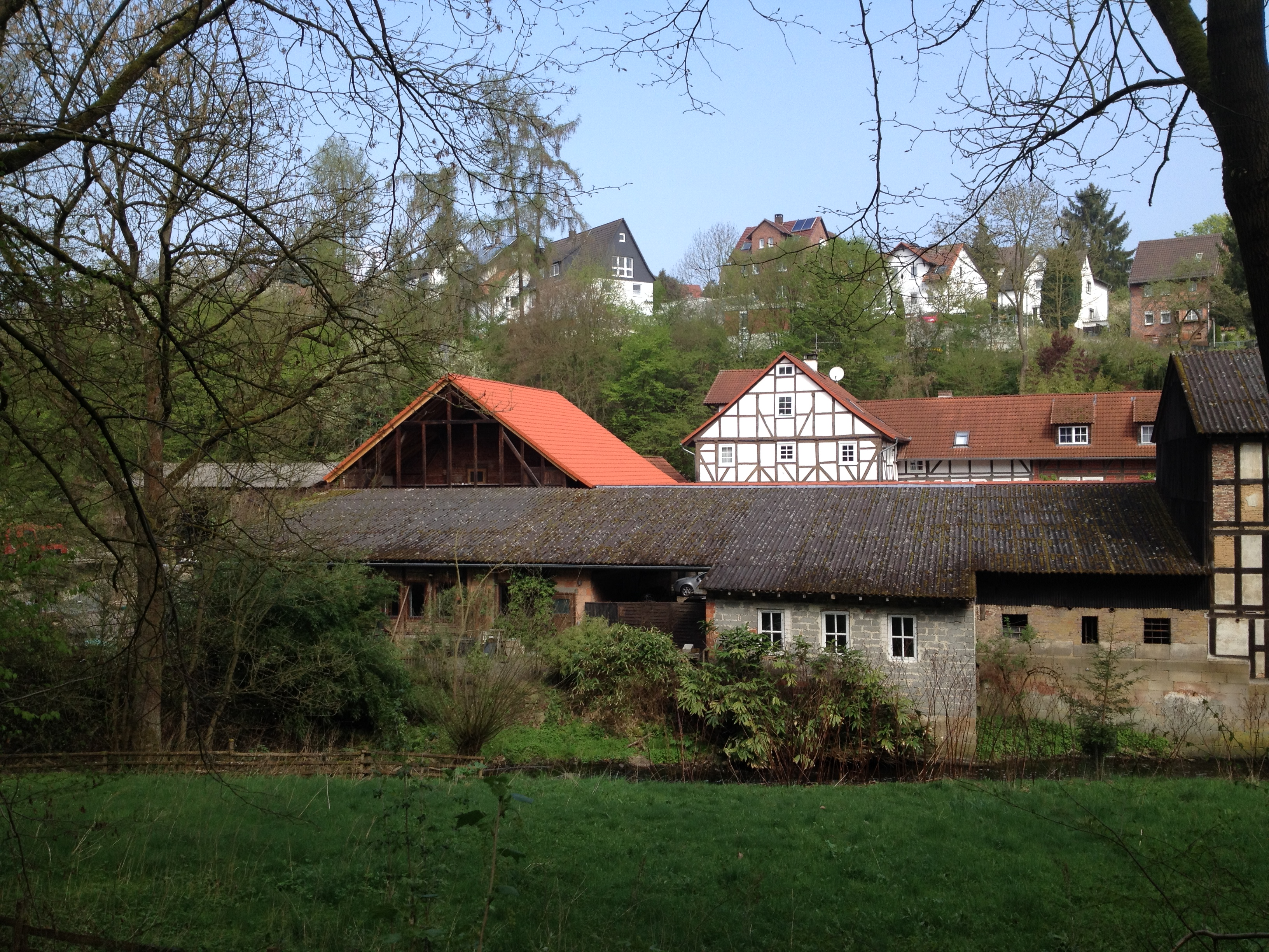 Eco Pfad Kulturgeschichte Guntershausen, Kassel-Steig, Baunapfad